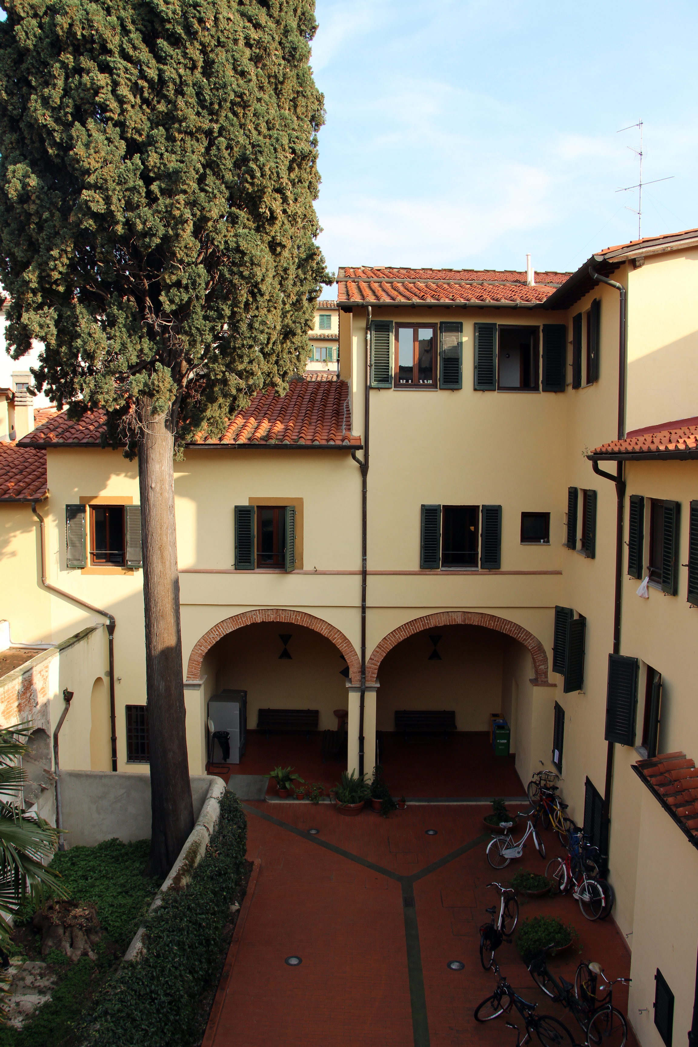 Firenze, miscellanea